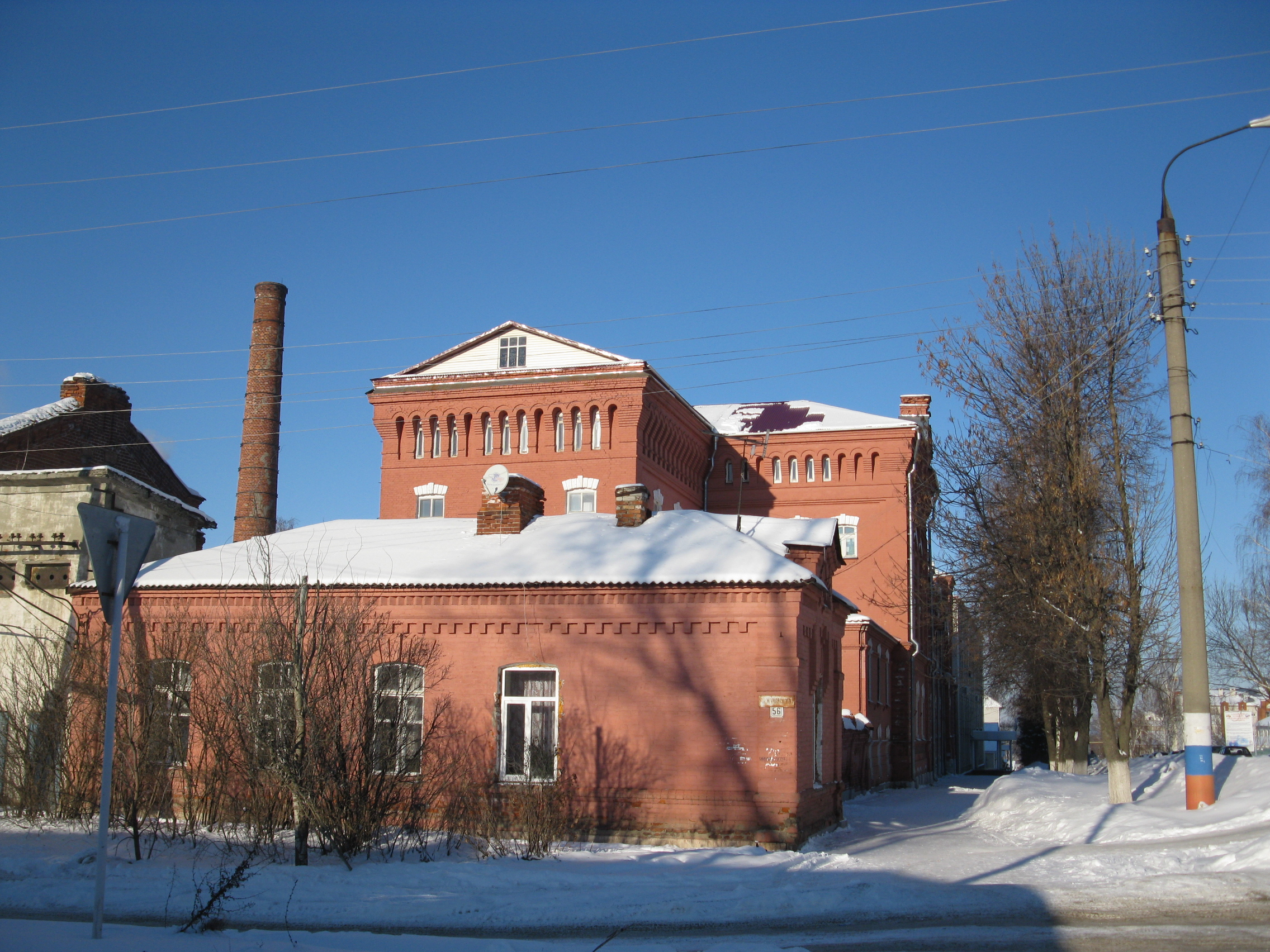 Бывший винный завод. Адрес: Алатырь, Первомайская ул., 46; Алатырь, Первомайская ул., 48